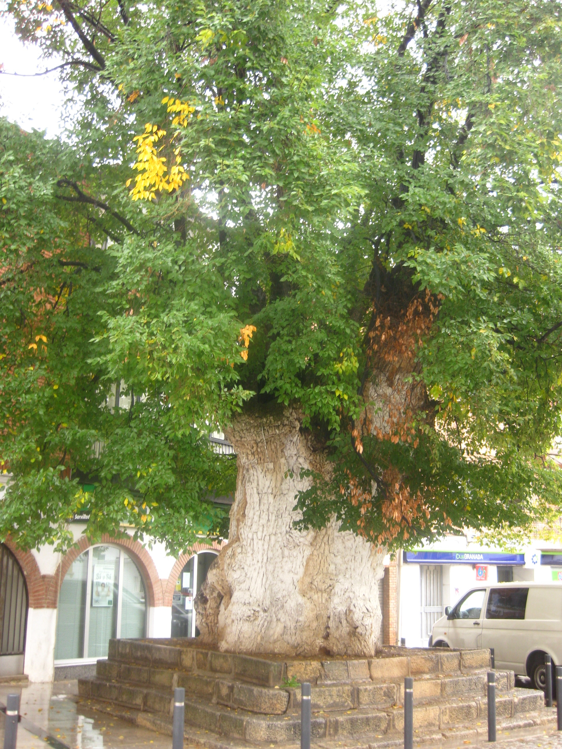 Gran olmo en la plaza de Cambil. Toda una maravilla del mundo vegetal que debemos admirar y respetar. Octubre de 2012